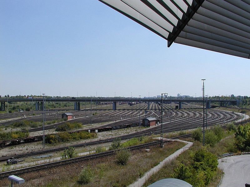 Richtungsgleise in München Nord Rbf